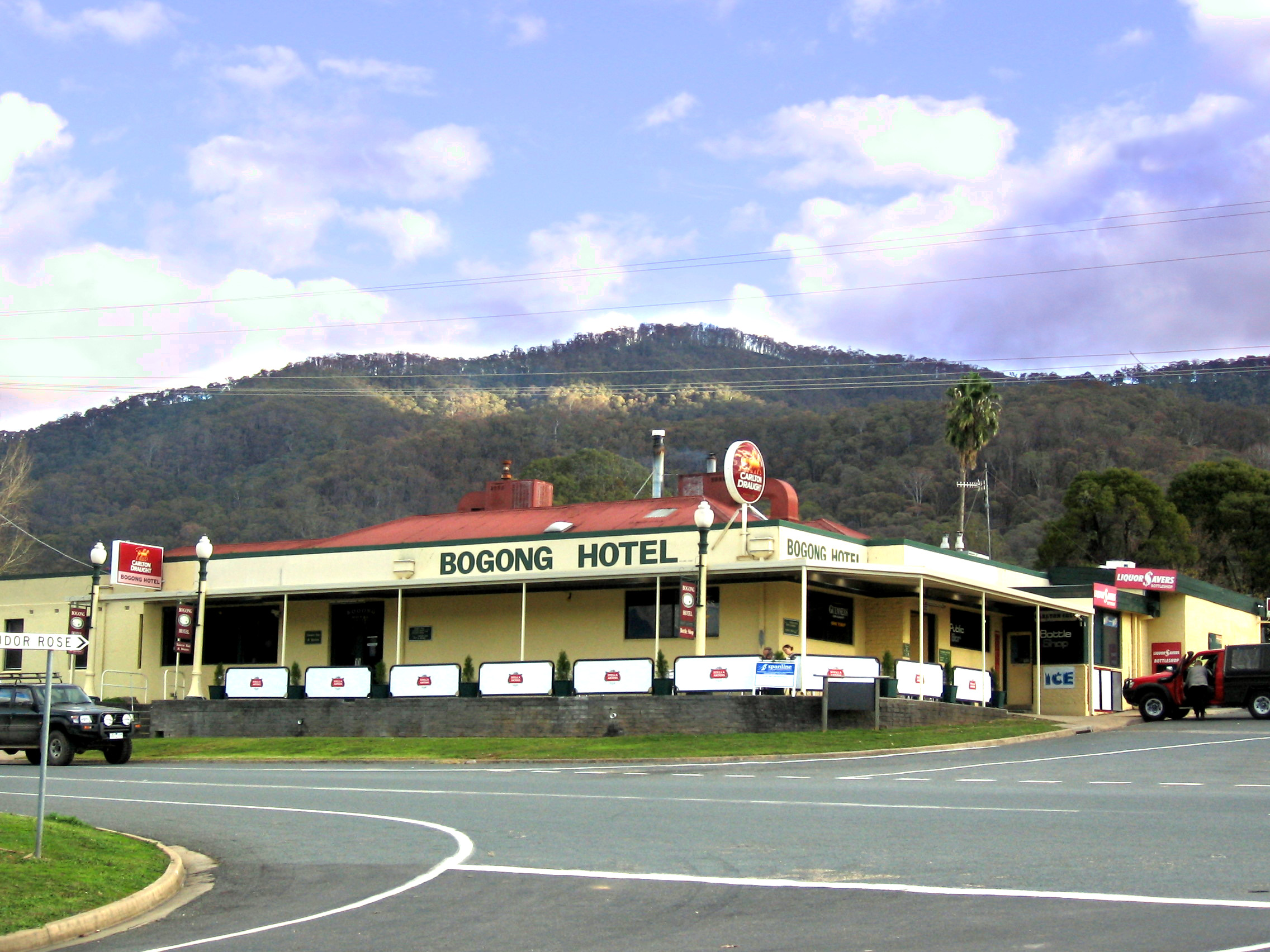 Bogong Hotel at Tawonga, Victoria